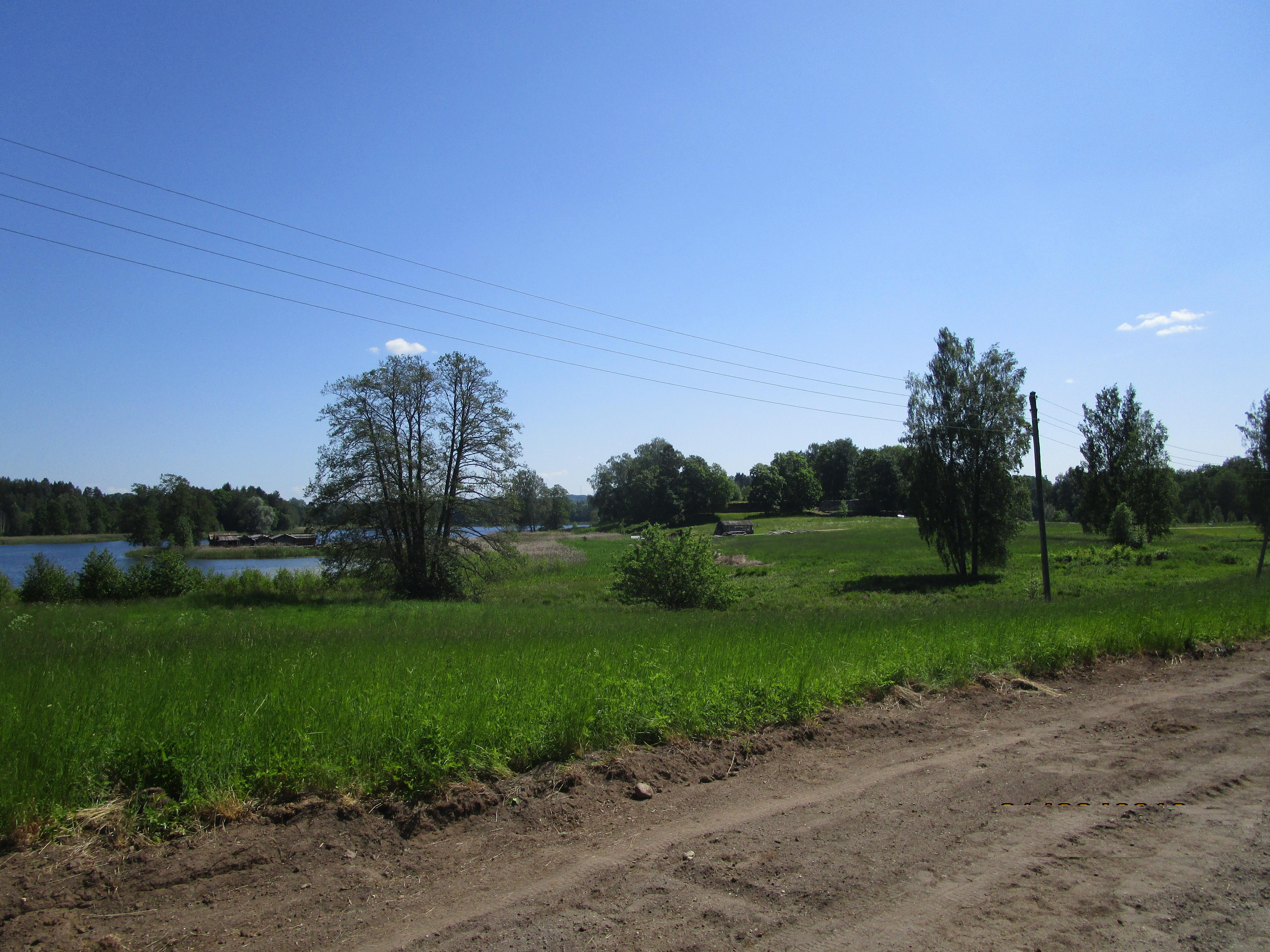 Āraiši - Archäologischer Park (See mit Insel links, Burg rechts)